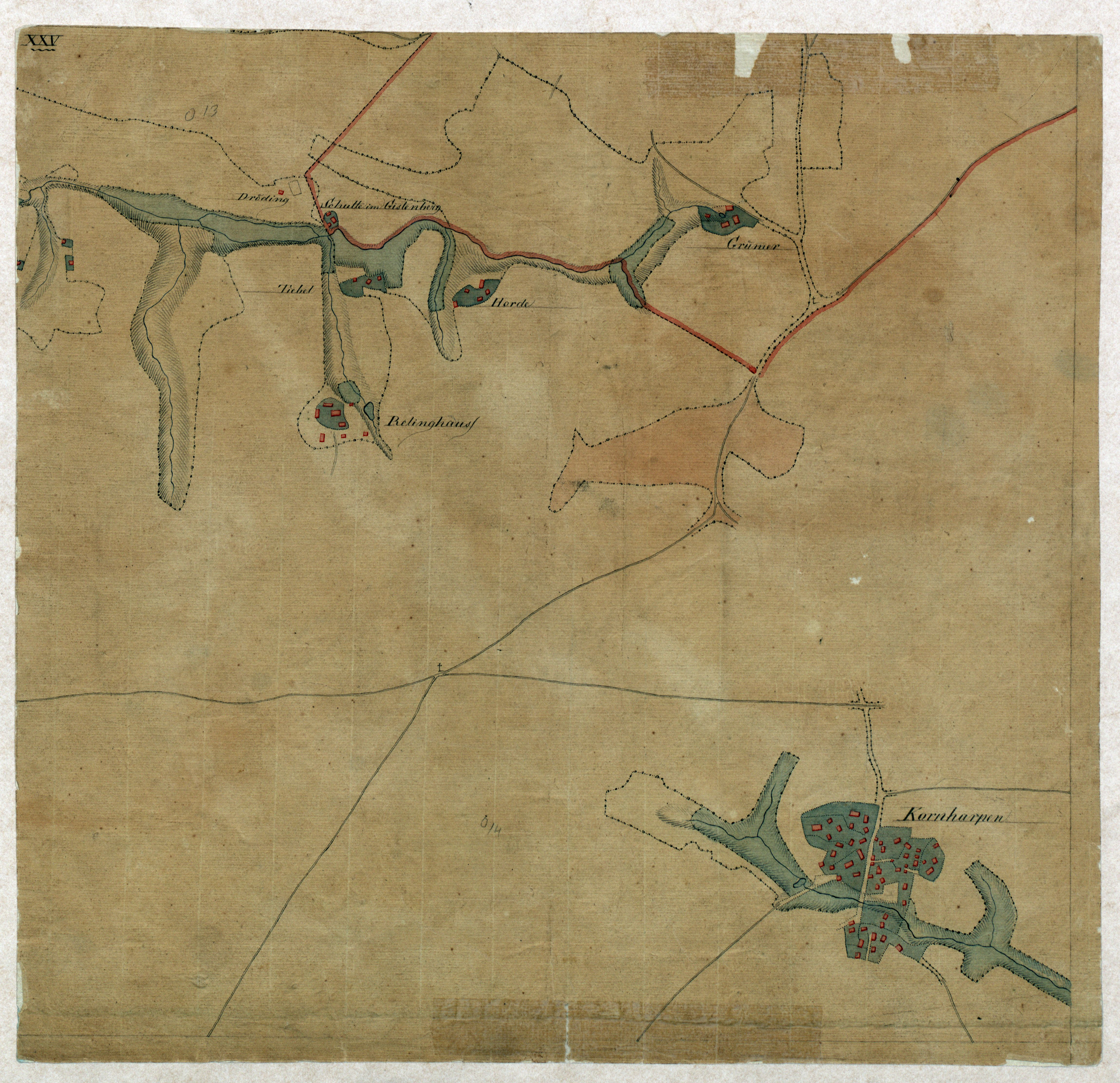 Spezialkarte des nördlichen Bereichs des Amts Bochum. Nachdruck „Carte speciale des mines“.